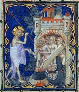 Petites Heures of Jean de France, Duc de Berry, folio 166